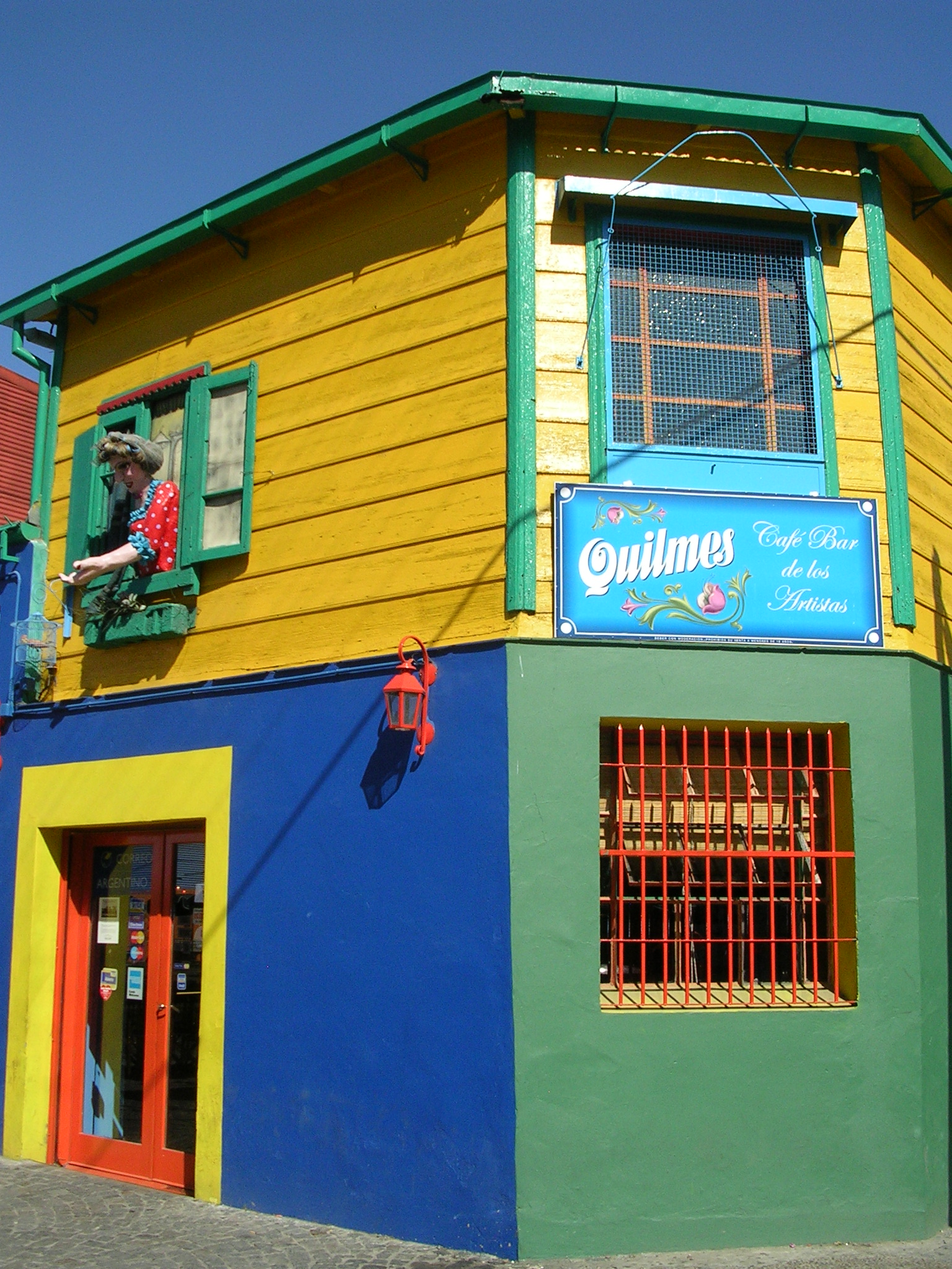 Barrio de La Boca en Buenos Aires